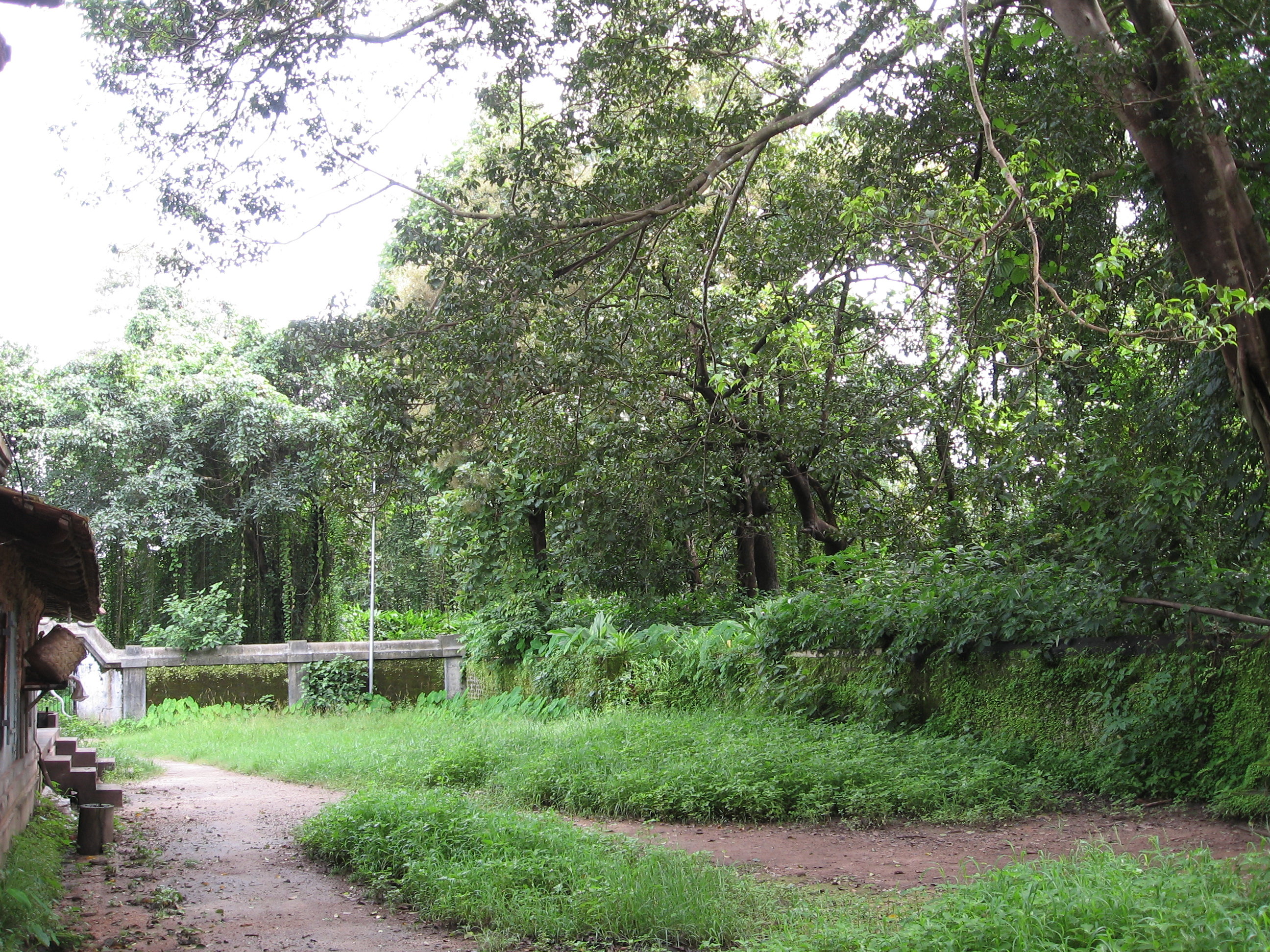 തെക്കേ കാവ്